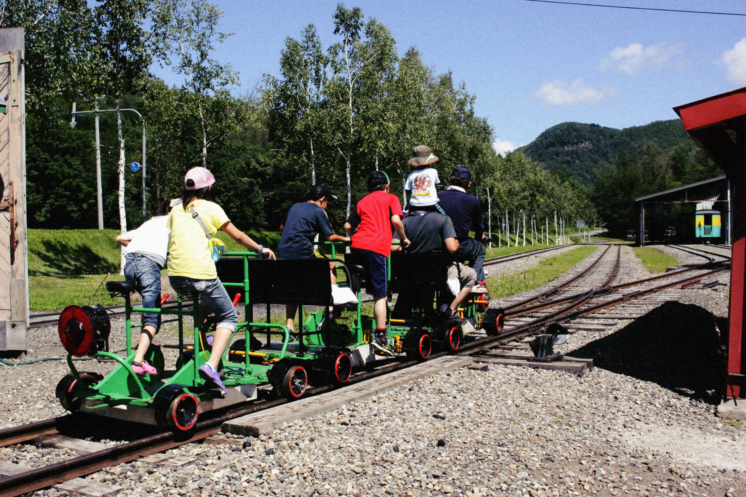 北海道遠軽町「丸瀬布森林公園いこいの森」園内軌道の軌道自転車（2014年撮影）